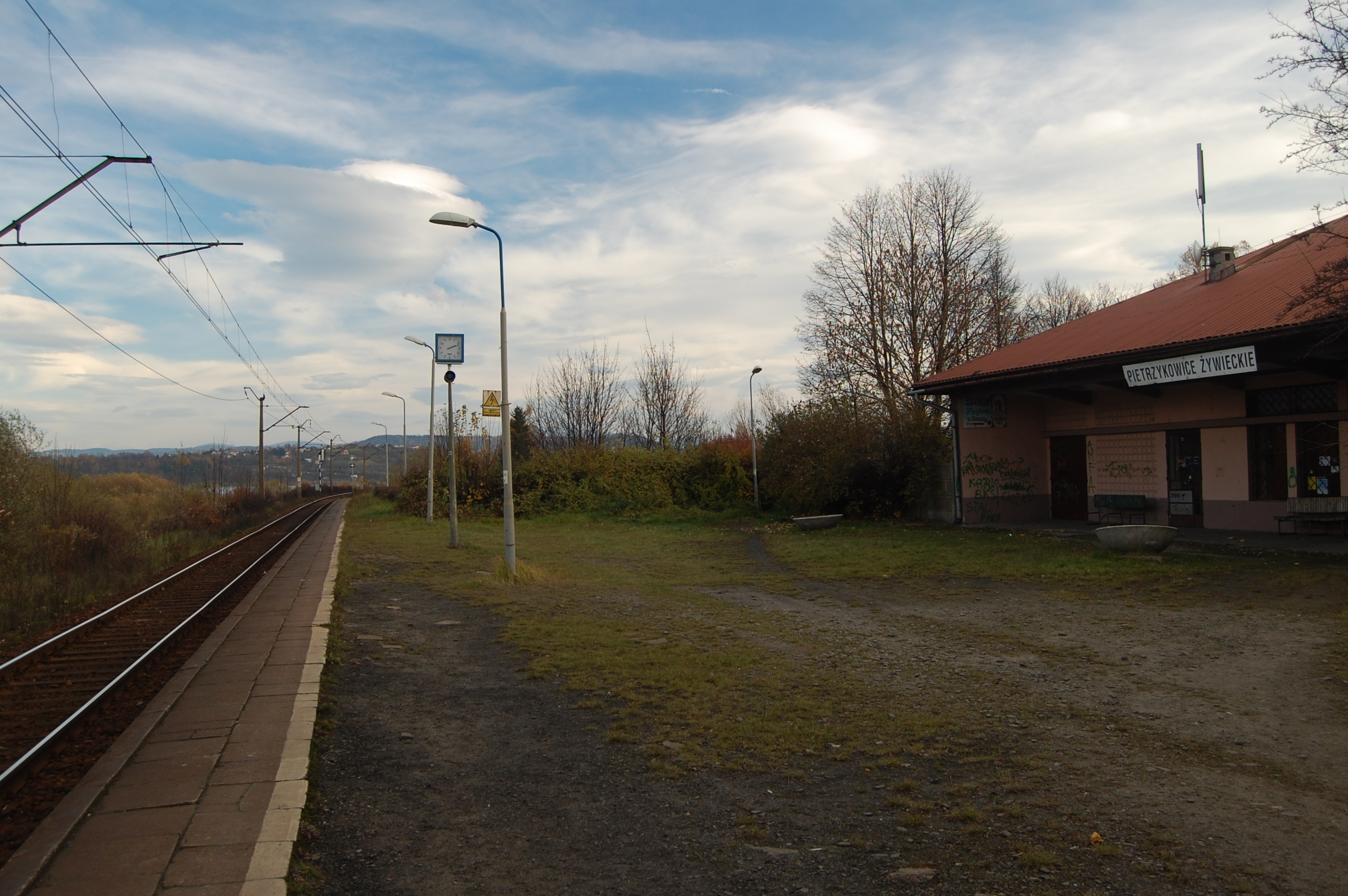 Przystanek kolejowy Pietrzykowice Żywieckie. Widok w kierunku Żywca.